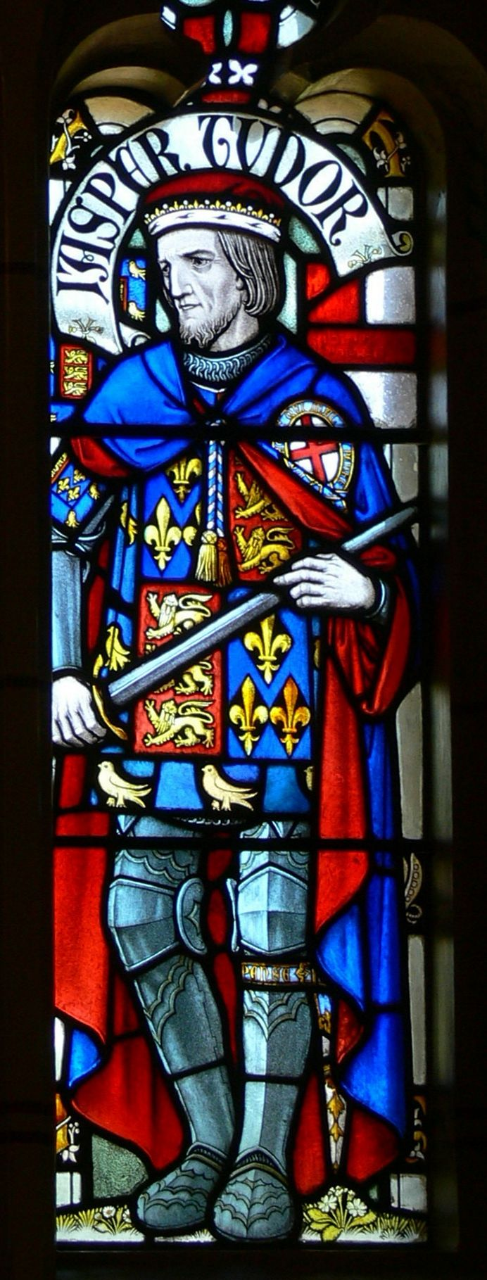 Siasber Tudur o ffenest yng Nghastell caerdydd.